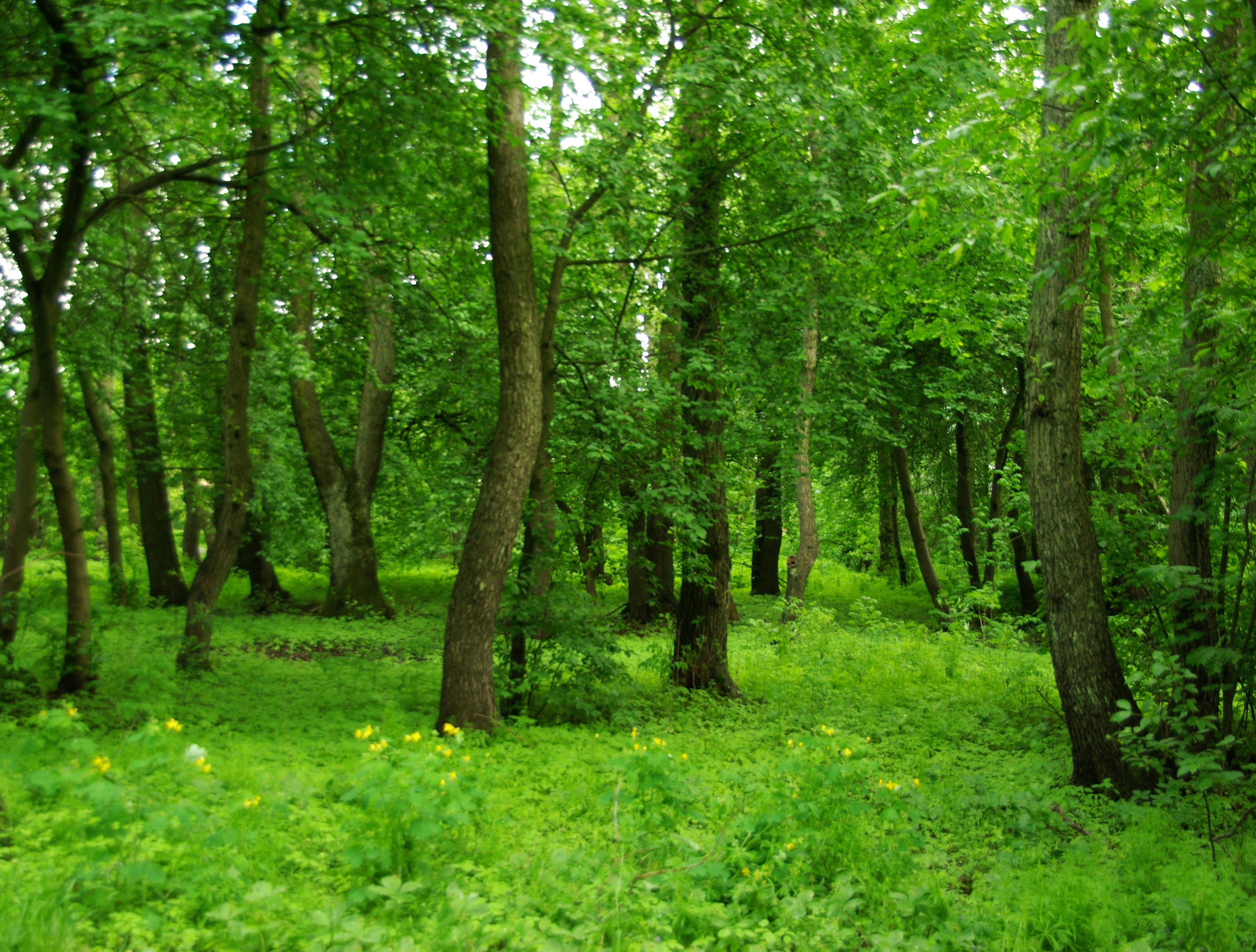 Viimsi sanglepik, Haabneeme